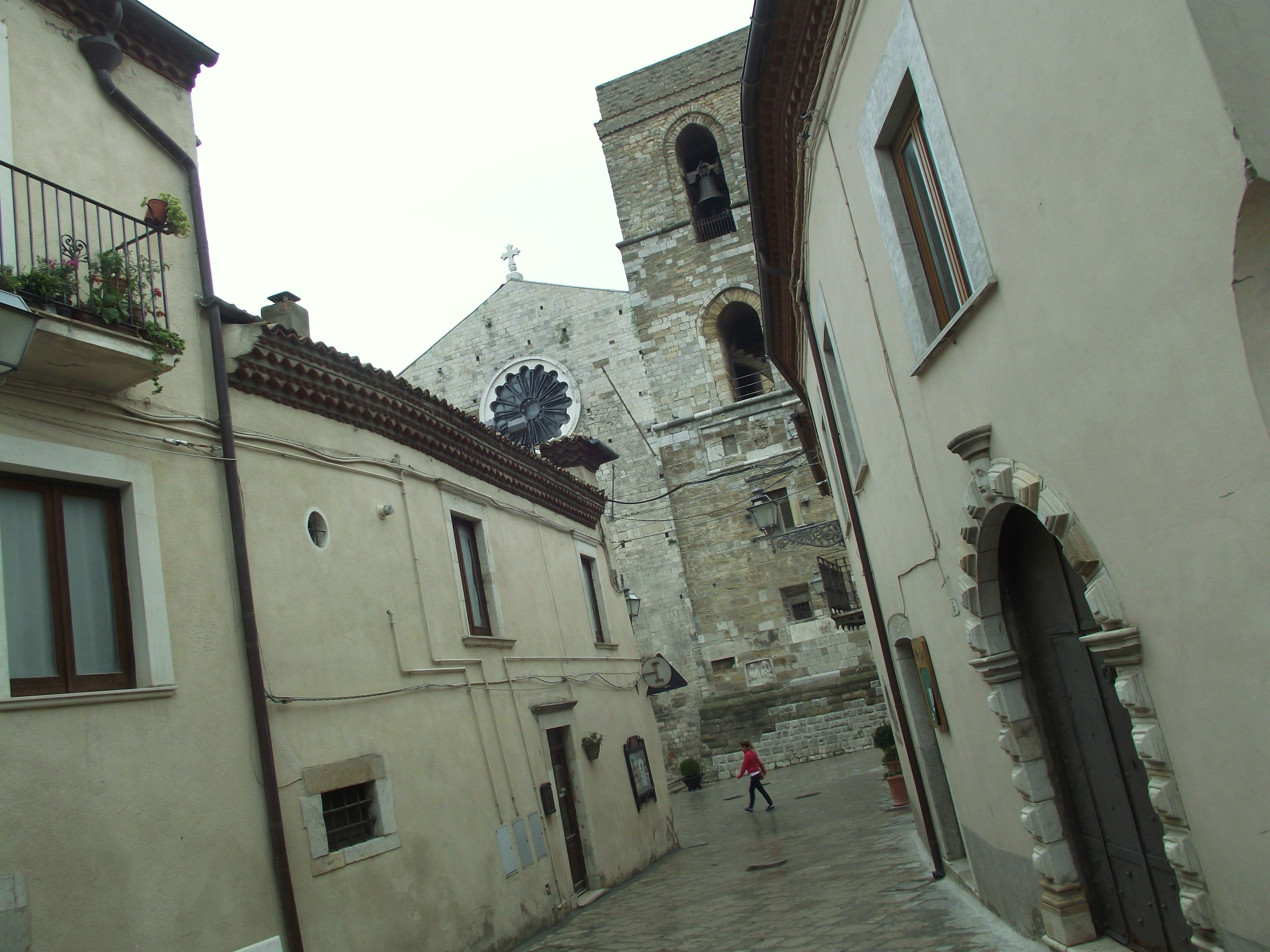 strada del centro storico di Acerenza con la Cattedrale